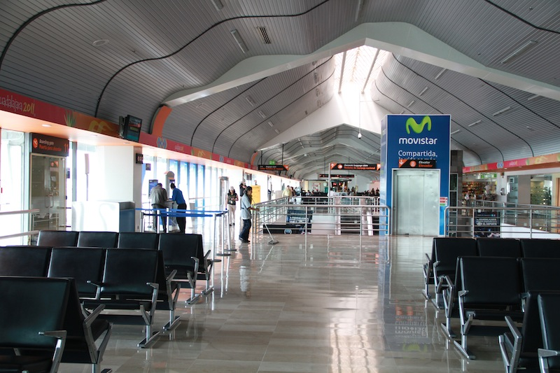 Aeropuerto de Guadalajara